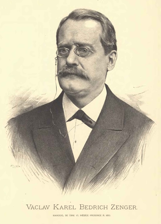 Portréty českých osobností od Jana Vilímka